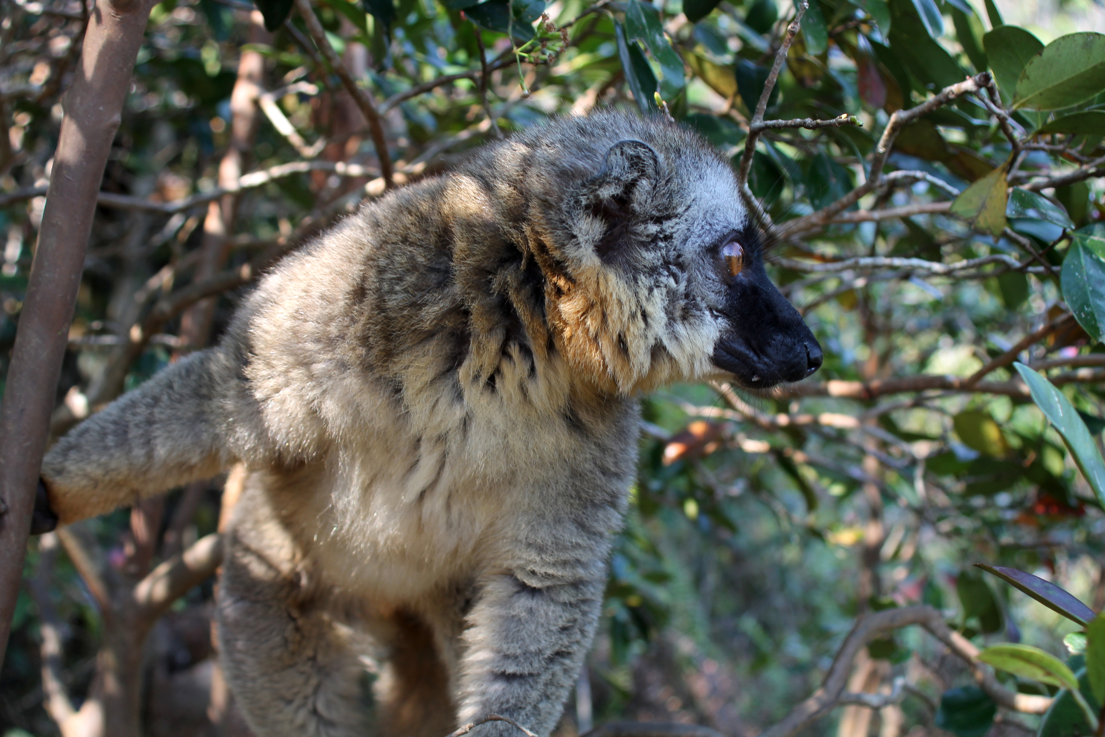 Bruine maki op het Vakona-eiland